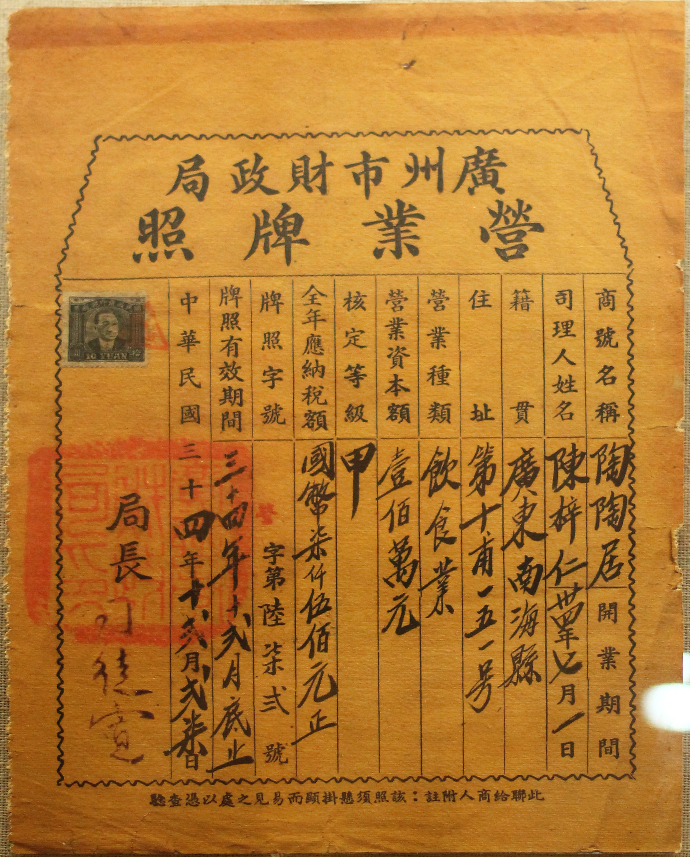 廣州市財政局營業牌照（陶陶居）。中華民國三十四年十弍月弍柒日。